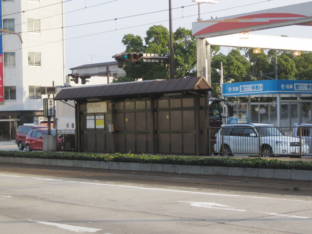 Toyohashi Kouen-mae Station (豊橋公園前駅), Toyohashi, Aichi, Japan